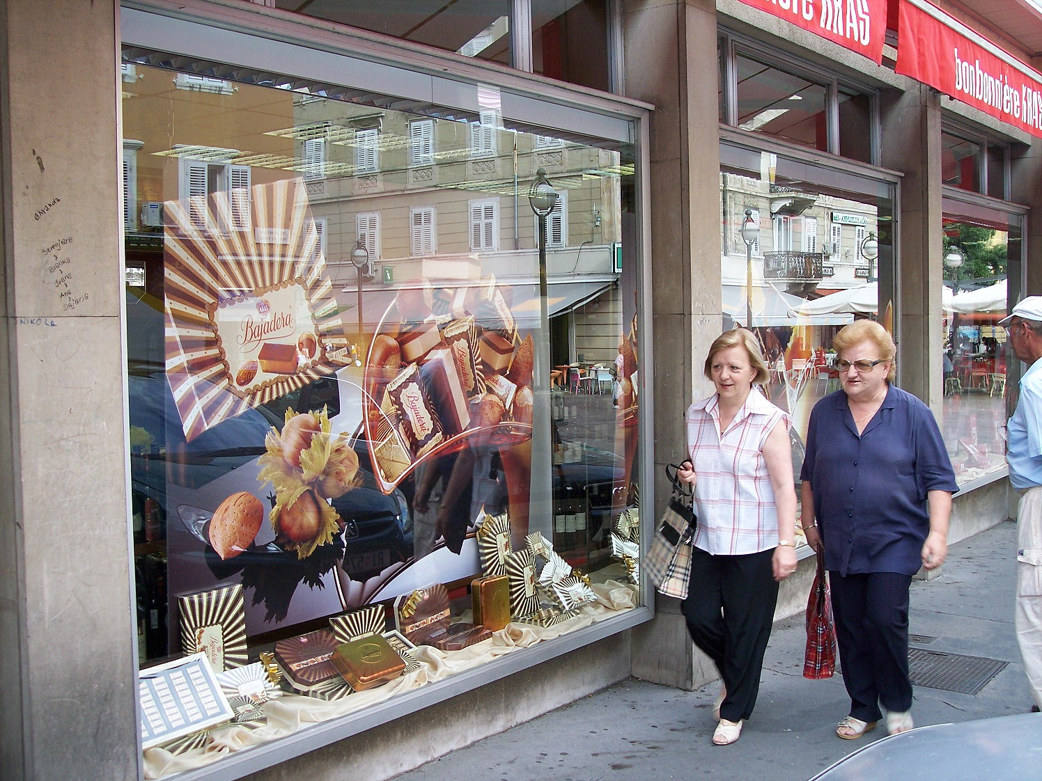 Rijeka (Croatia) Italian and Hungarian name: Fiume